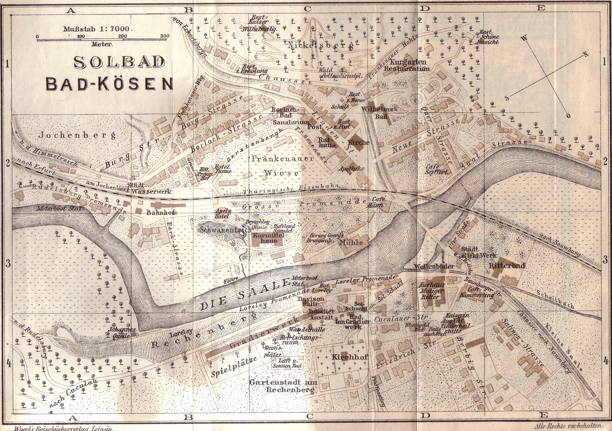 Map Bad Kösen ca. before 1910